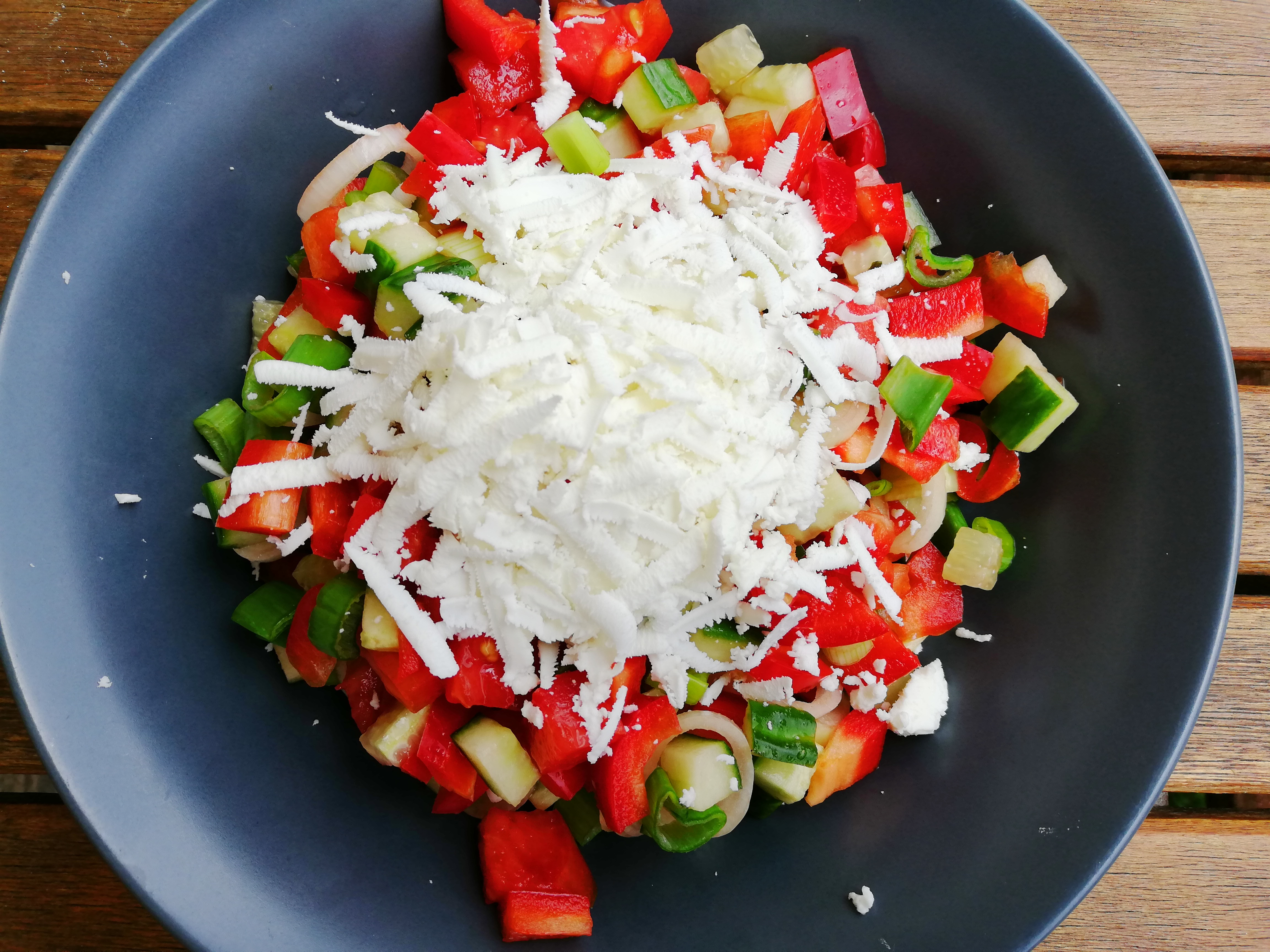 salade chopska avec concombre, oignon, tomate, poivron et fromage de type feta rapé.